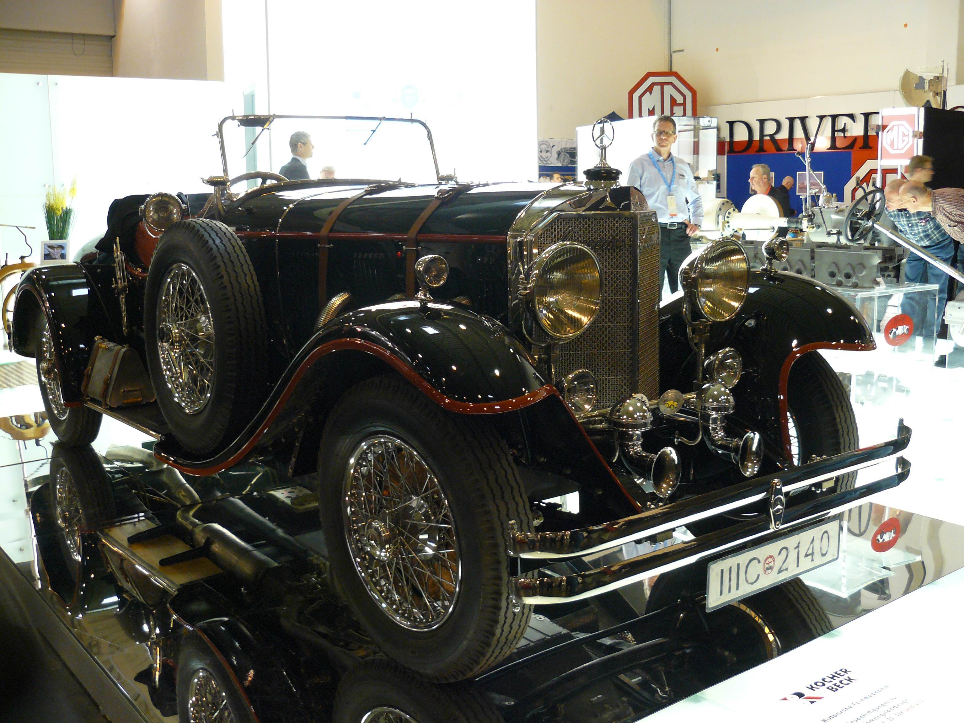 Essen 2011